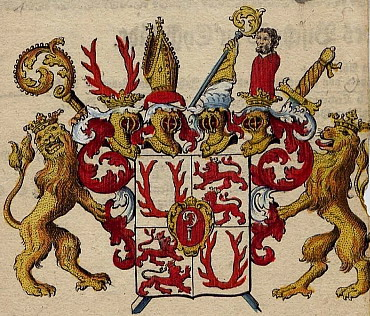 Bischöfliches Wappen des Eichstätter Fürstbischofs Franz Ludwig Schenck von Castell